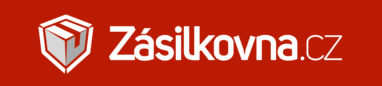 Zasilkovna CZ logo